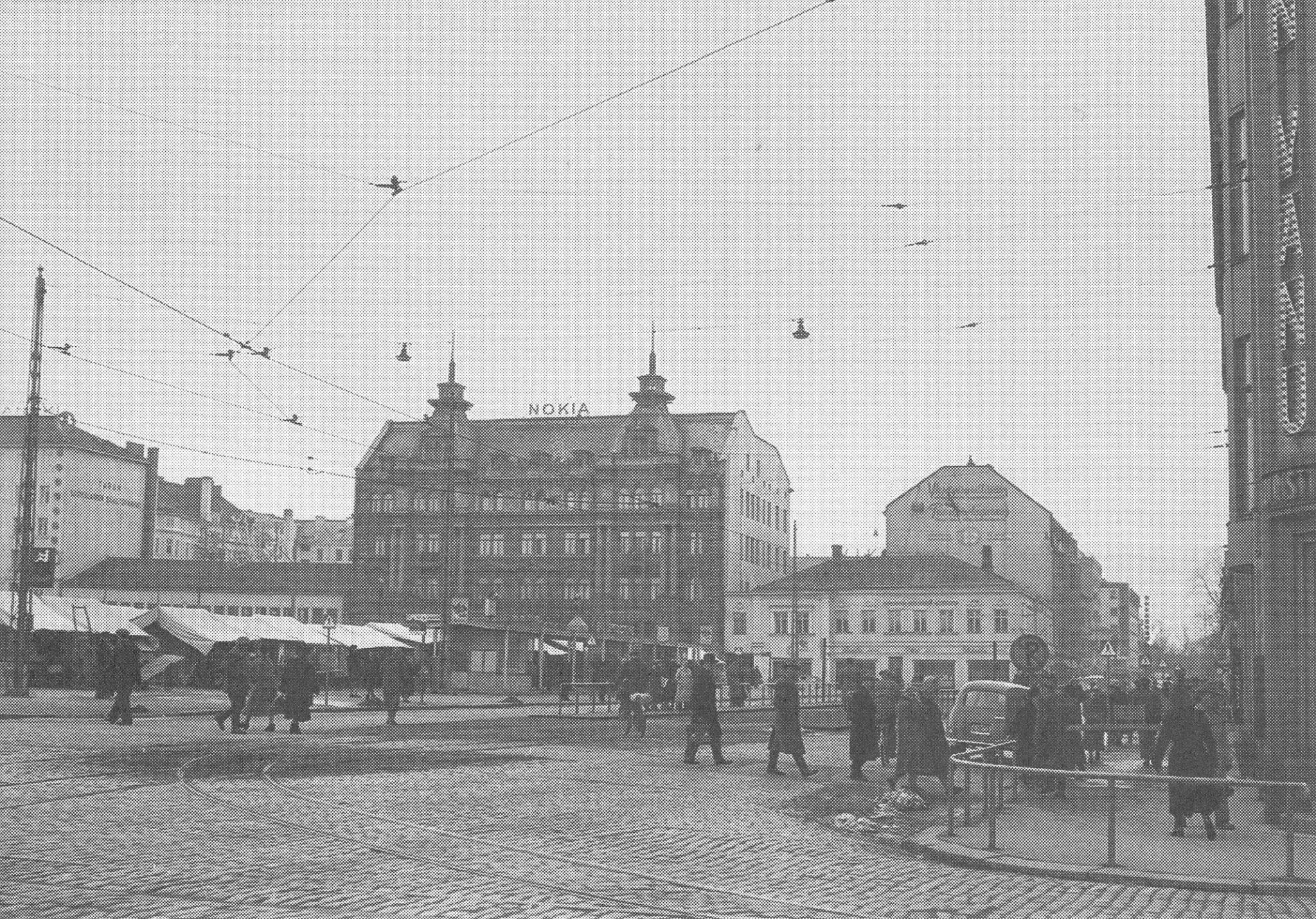 Turun kauppatori vuonna 1955